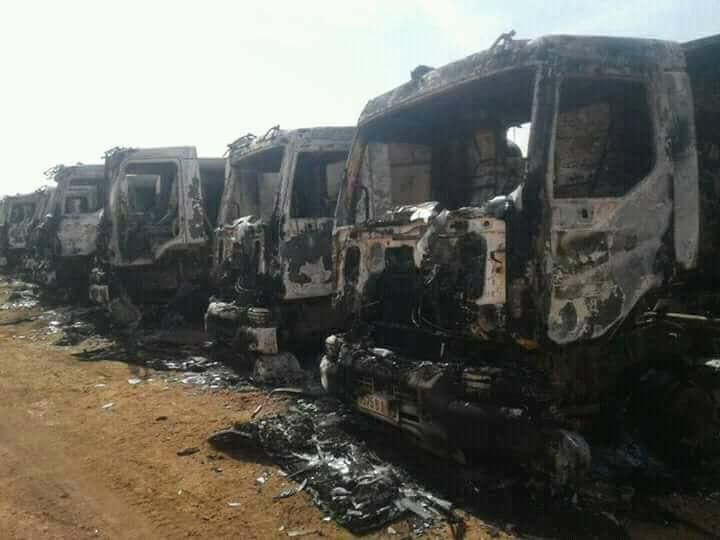 Plusieurs véhicules appartenant à la société Sogea Satom chargée de construire la route Tombouctou-Niono brûlés lors d’une attaque dans le cercle de Niafounké région de Tombouctou, au Mali, 25 octobre 2017.